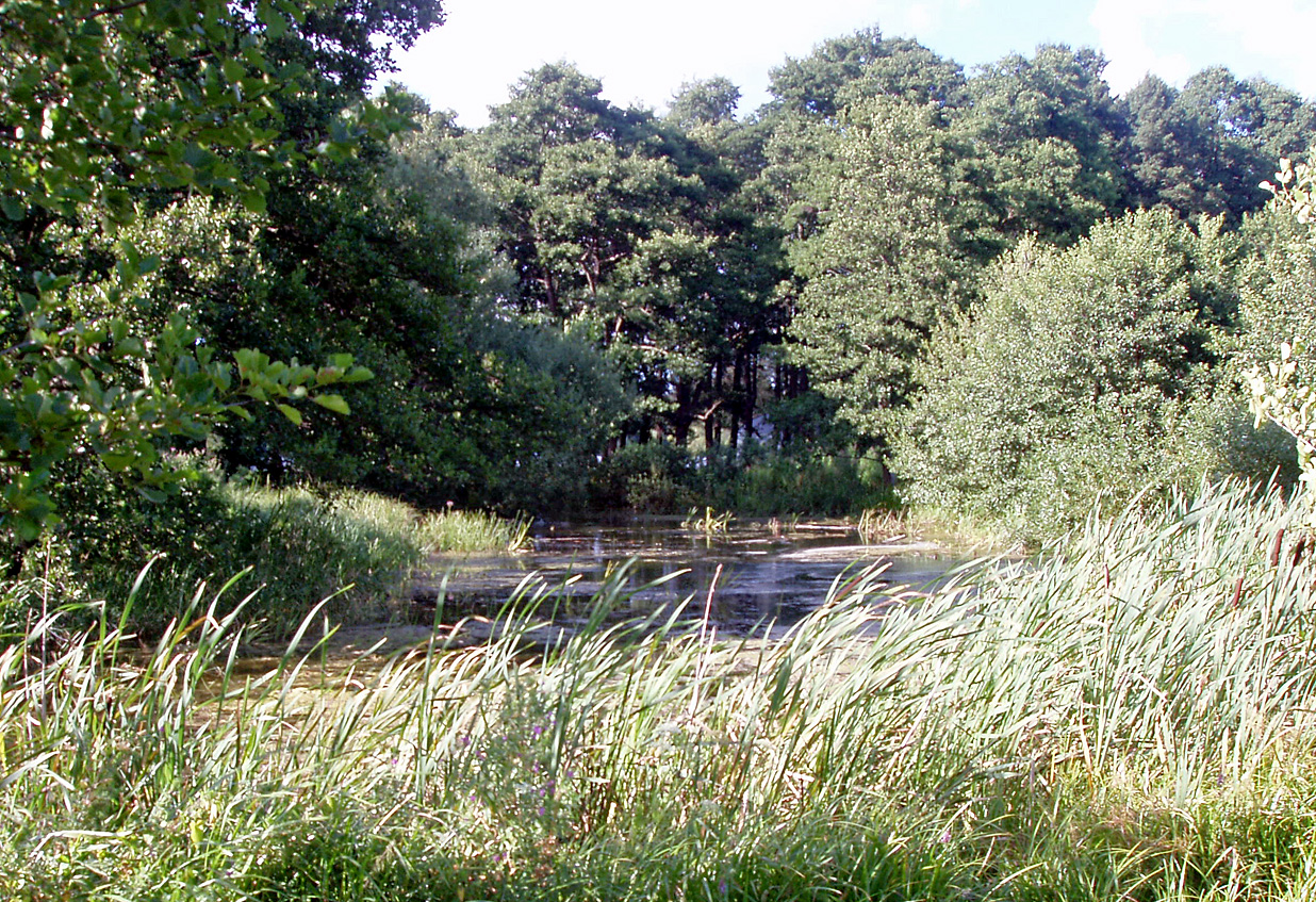 Voldgraven ved Hjortholm Voldsted, der ligger ved den sydøstlige ende af Furesøen, ved Frederiksdal i Sorgenfri Sogn, Lyngby-Taarbæk Kommune. Sjælland, Denmark Hjortholm Voldsted